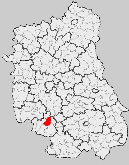 Map of gmina Godziszów, Janów Lubelski county, Lublin voivodship Mapa gminy Godziszów, powiat janowski, województwo lubelskie